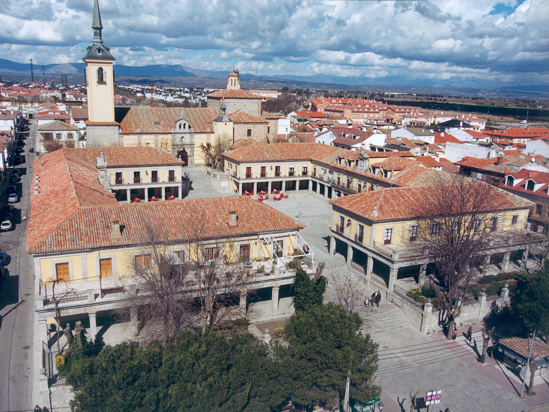 Vista aérea de la Plaza Mayor de Brunete.